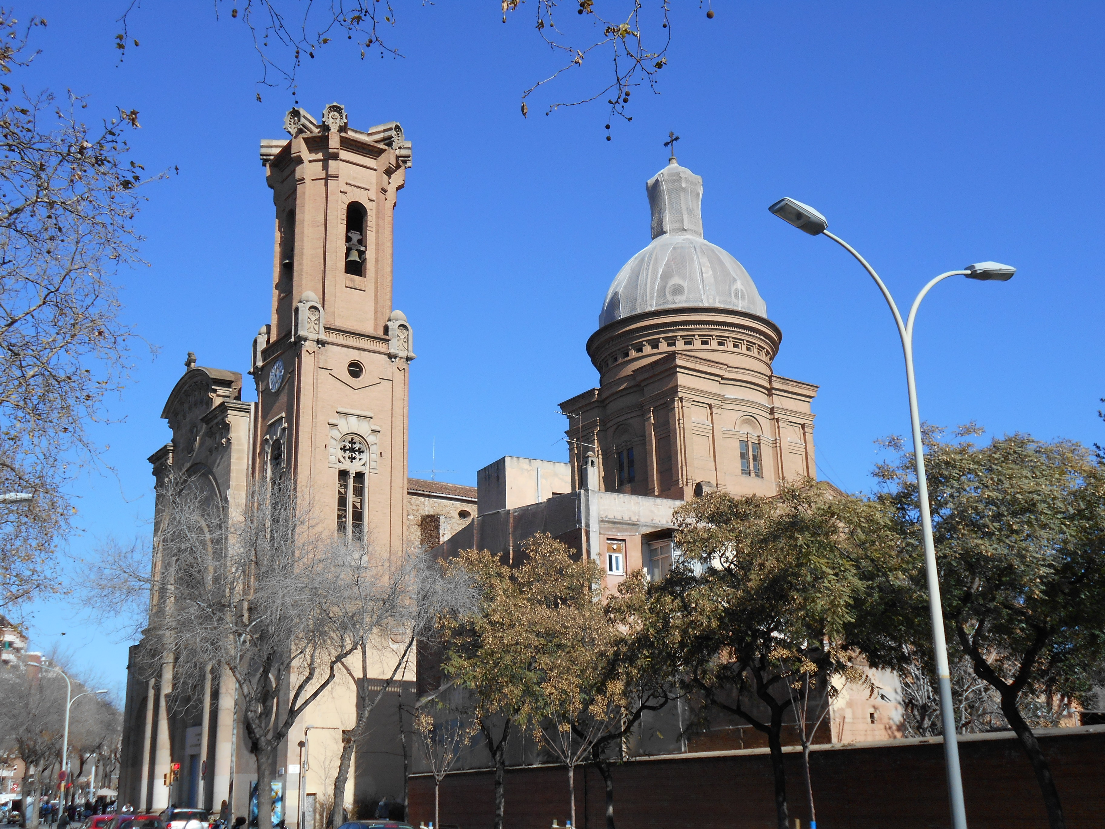 Iglesia de San Andrés de Palomar, Barcelona.